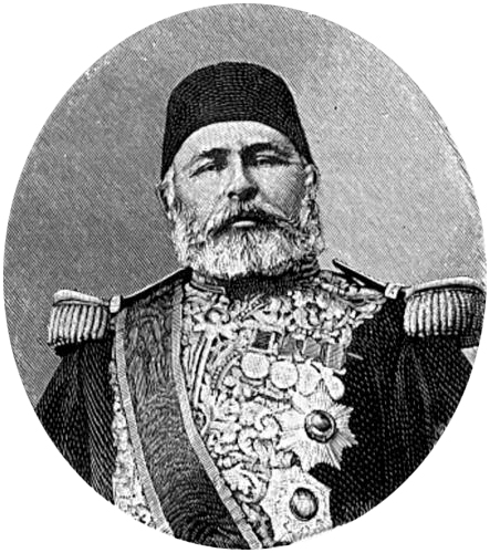 Hussein Avni Pasha (1820– 1876), an Ottoman statesman.